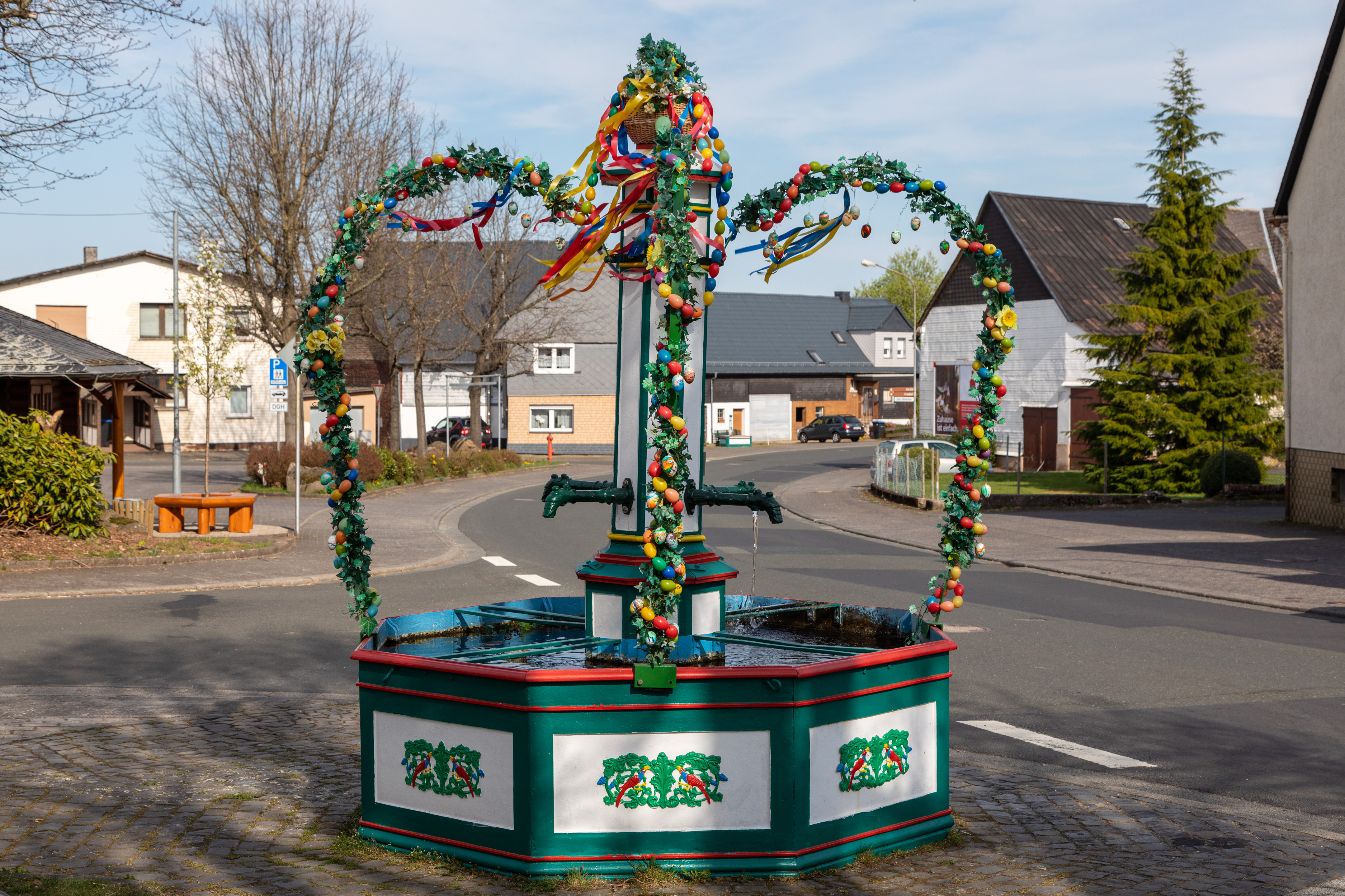 Dorfbrunnen Rabenscheid (Kulturdenkmal)